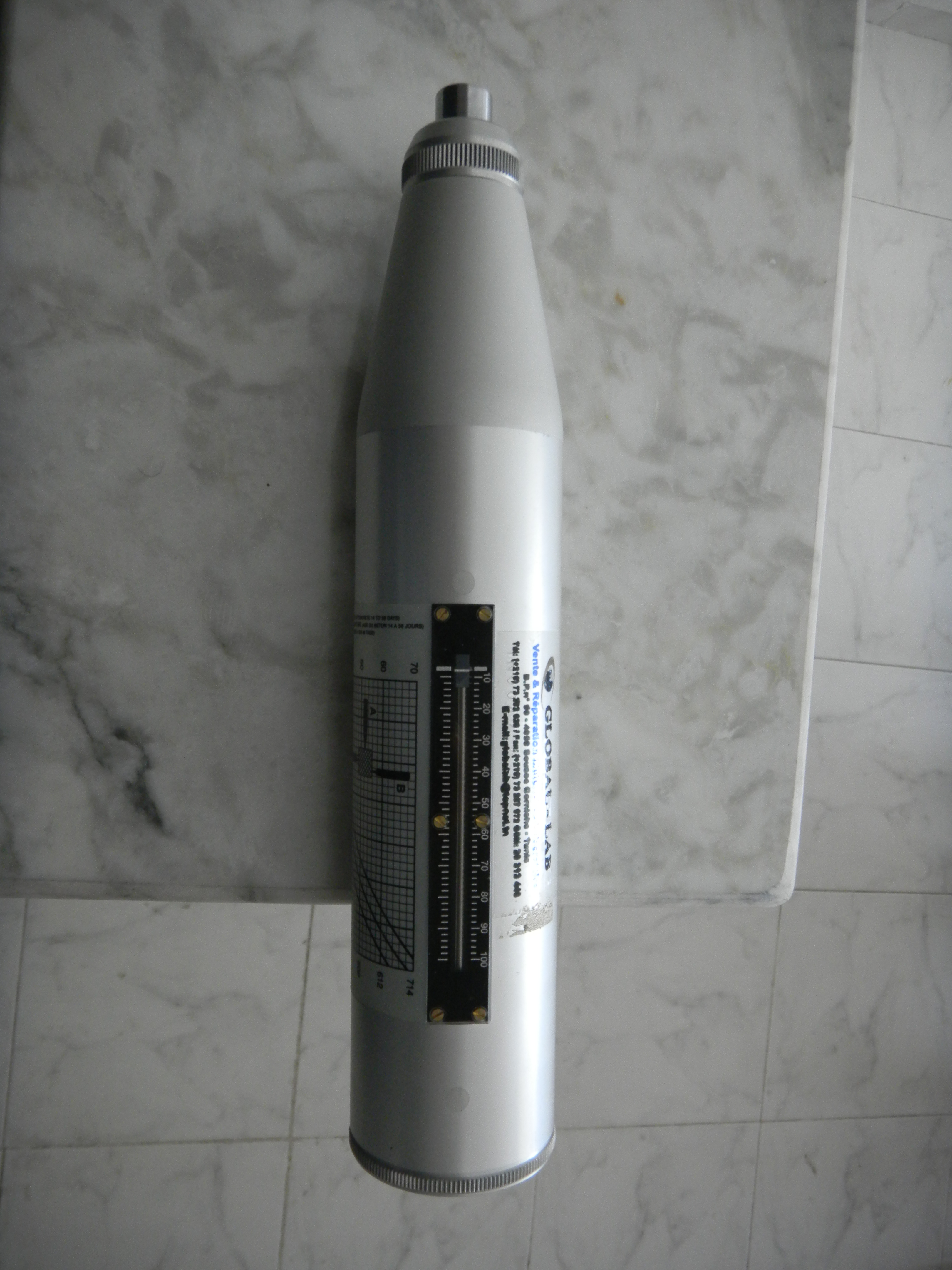 Scléromètre à béton mécanique permettant de Mesurer la Dureté de surface du béton.